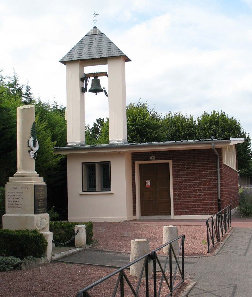 église à campanile et monument aux morts pour la France